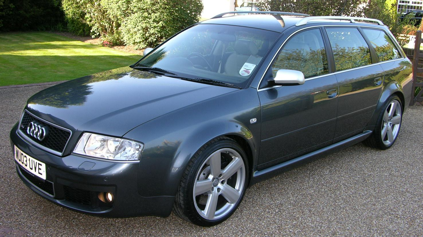 Audi RS6 Avant